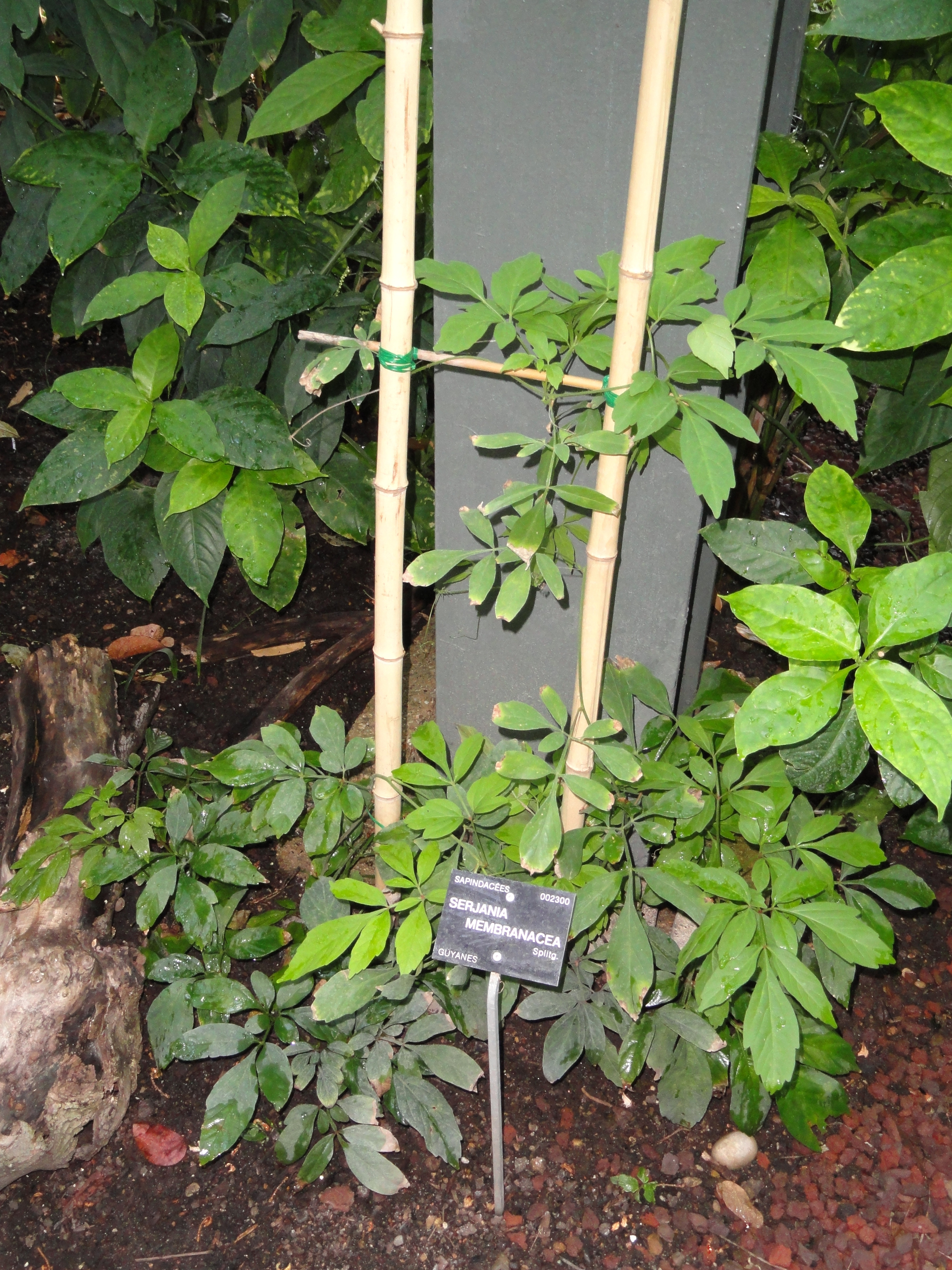 Serjania membranacea specimen in the Jardin Botanique de Lyon, Parc de la Tête d'Or, Lyon, France.